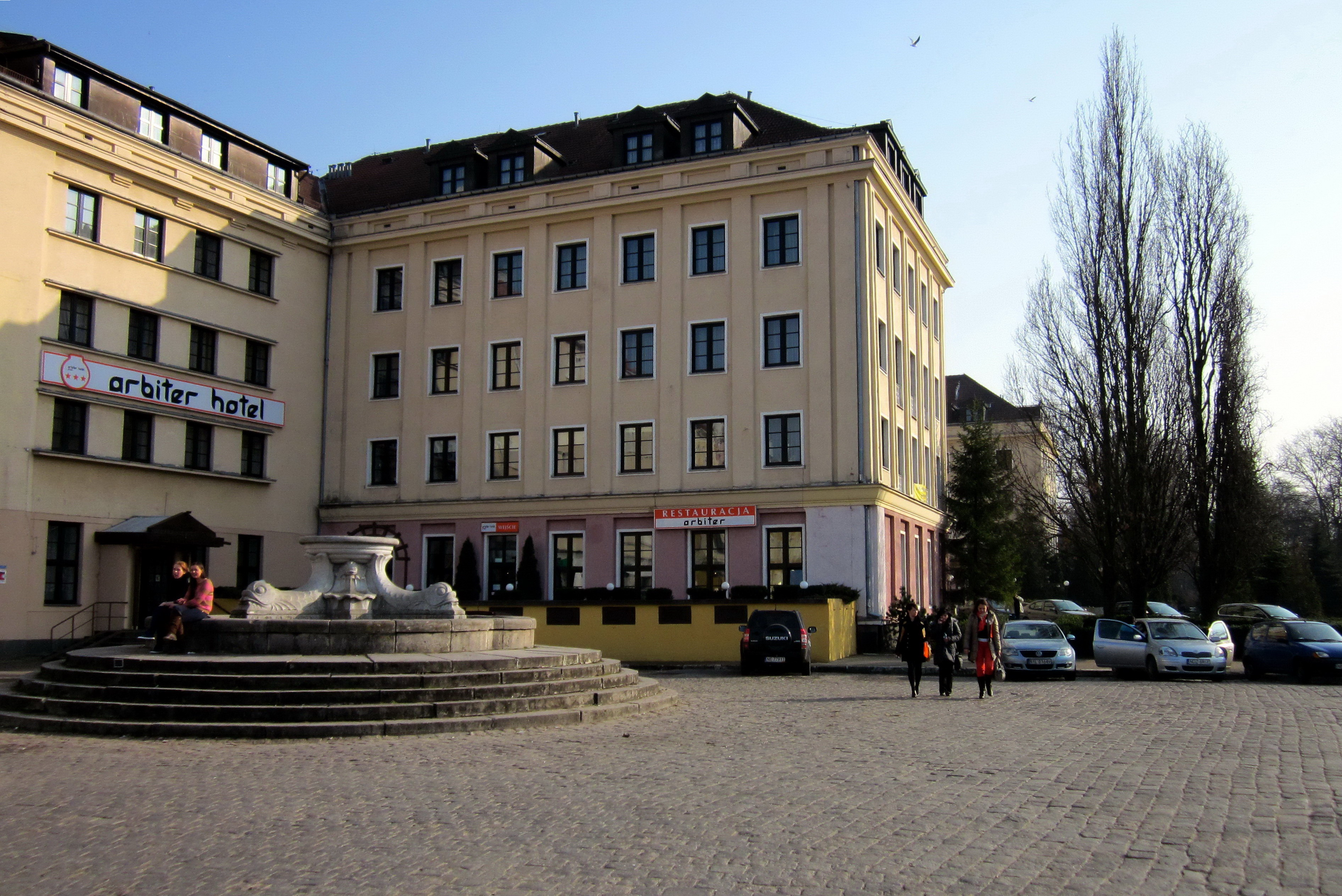 Plac Słowiański. Hotel Arbiter. Elbląg.